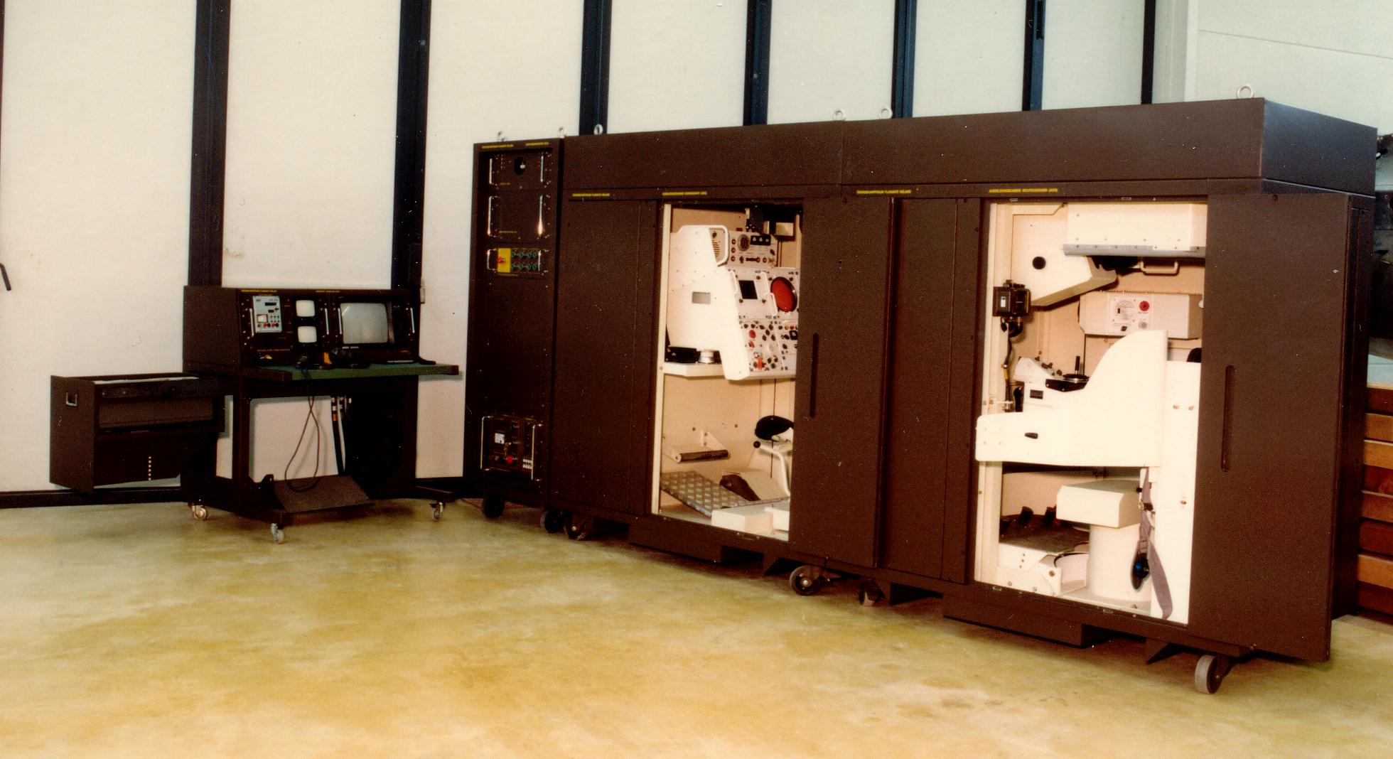 Übungskampfraum Roland: Simulator zur Bedienerschulung